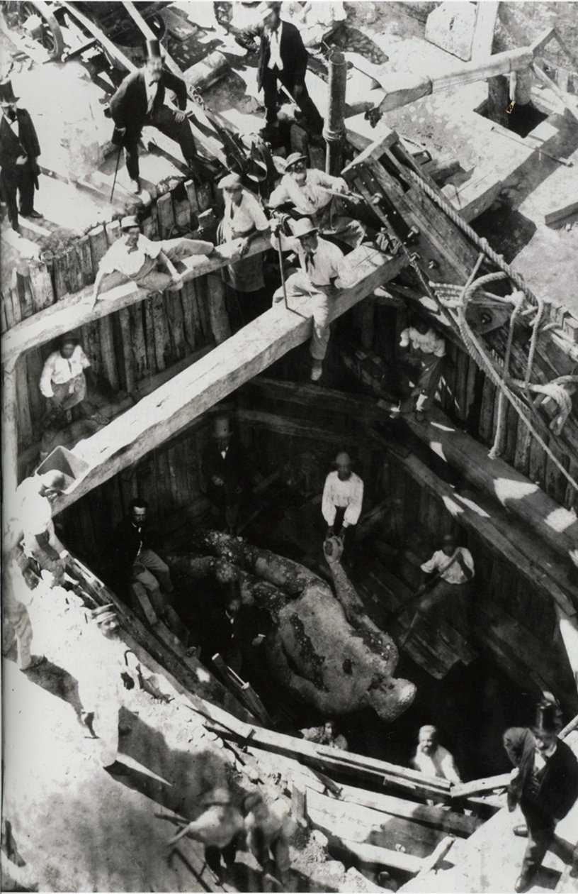 Lo scavo della statua di Ercole a palazzo Pio-Righetti (piazza del Biscione), nel 1864